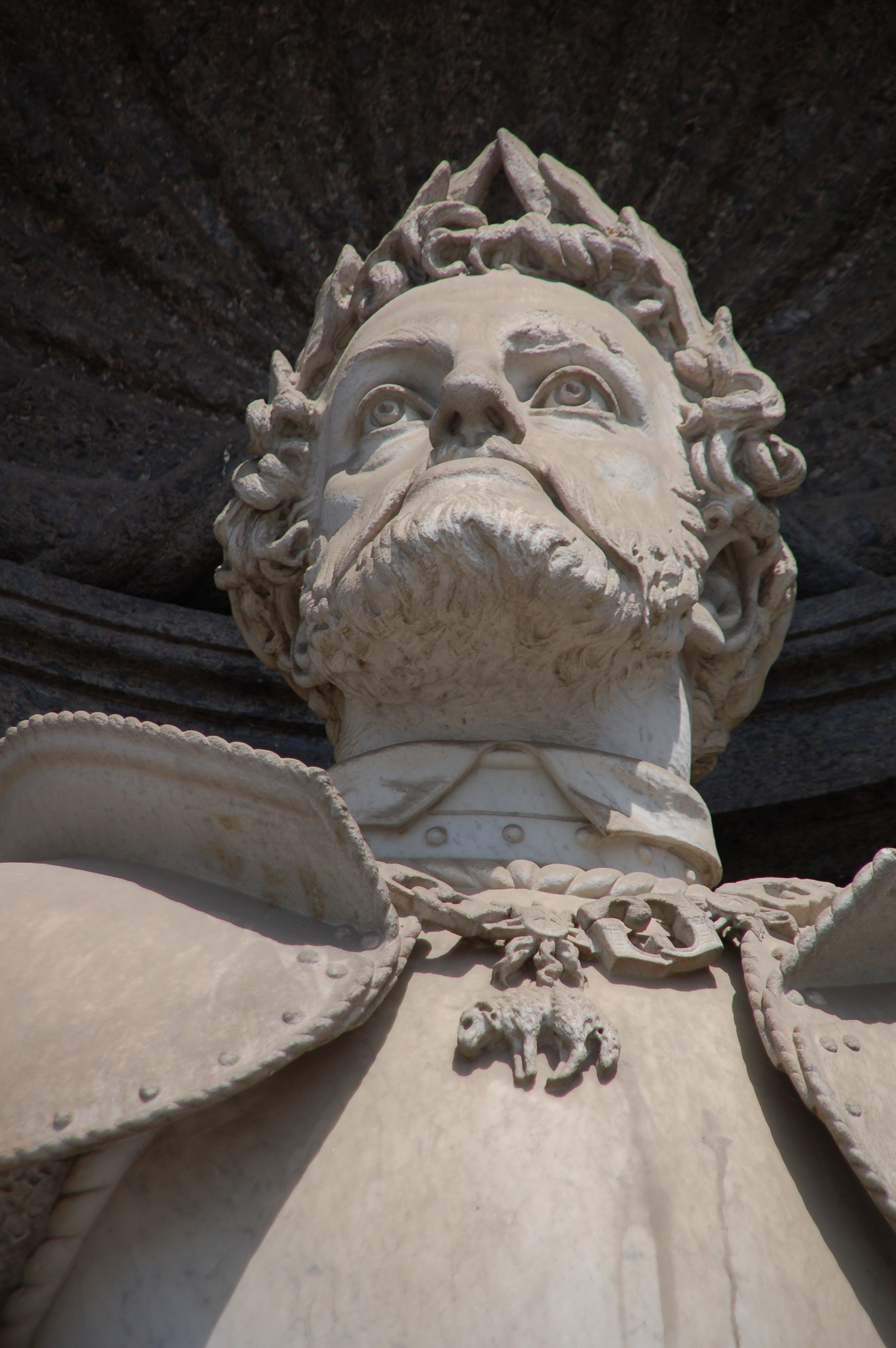 Statua sulla facciata del Palazzo Reale di Napoli: Carlo V d'Asburgo - Habsburg (Carlo V imperatore del Sacro Romano Impero, Carlo I di Spagna)